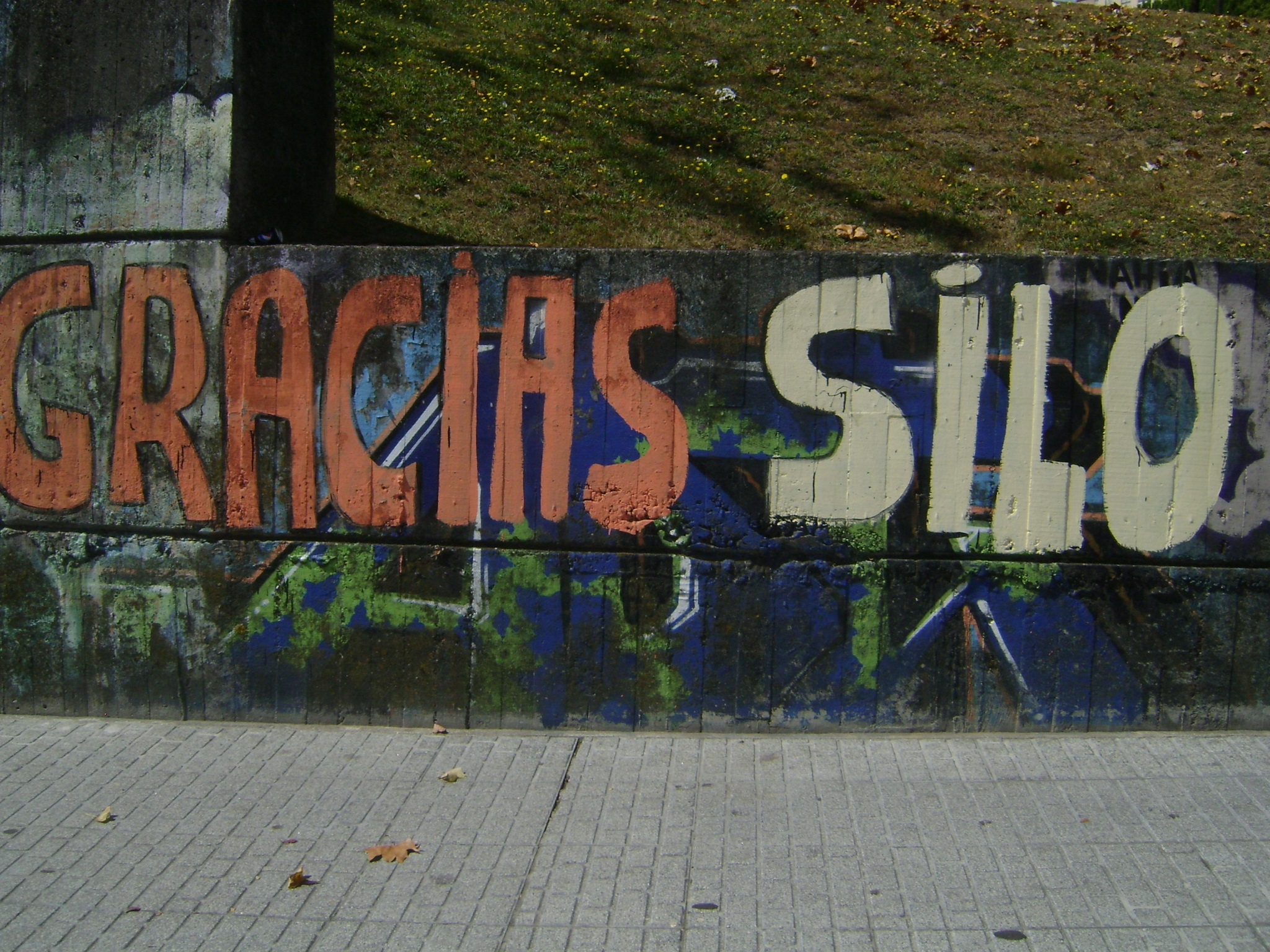 Graffiti en apoyo a Silo, fundador del Movimiento Humanista.